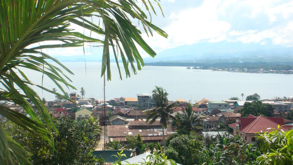 بحيرة مدينة مراوي